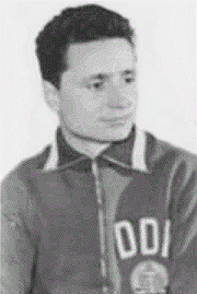 Title: Fußball-Nationalmannschaft der DDR Factual corrections and alternative descriptions are encouraged separately from the original description. Additionally errors can be reported at this page to inform the Bundesarchiv. Original historic description: Zentralbild/Studre Stu-Pr 12.2.1964 Tableau. Fußball-Nationalmannschaft der DDR. Oben v.l.n.r.: Trainer Karoly Soos, Nationalspieler Klaus Urbanczyk, Werner Unger, Hermann Stöcker, Otto Fräßdorf, Wolfgang Barthels. Mitte v.l.n.r.: Harald Fritzsche, Hans-Jürgen Heinsch, Hennig Frenzel, Gerhard Körner, Werner Linß, Klaus-Dieter Seehaus. Unten v.l.n.r.: Dieter Erler, Heino Kleiminger, Eberhard Vogel, Herbert Pankau, Manfred Weikert, Trainer Hans Studner. In den frühen Morgenstunden des 12.2.1964 trat die Fußball-Olympiaauswahl unserer Republik ihre Reise nach Afrika an. Vom 14.2. bis 19.2.1964 wird sie in der VAR drei Spiele austragen, danach am 23.2.1964 in Kumasi gegen die ghanesische B-Auswahl und am 26.2.1964in Acora zum ersten offiziellen Länderspiel gegen Ghana antreten.